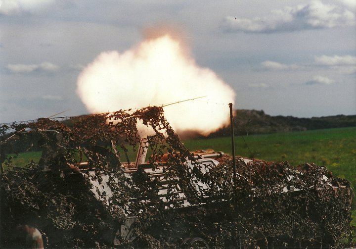 Mortero autopropulsado VCTM